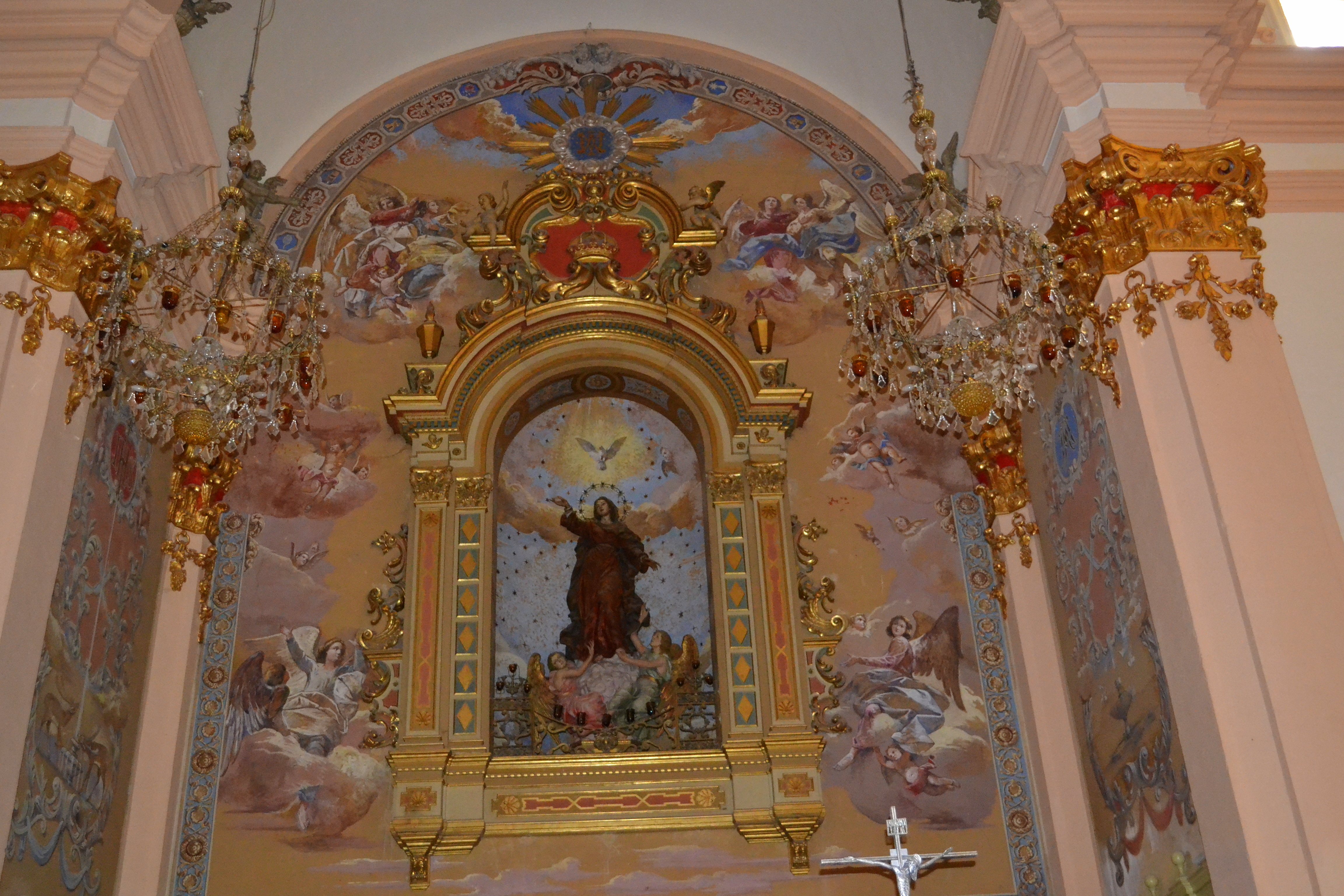 Església de Santa Maria de Guissona